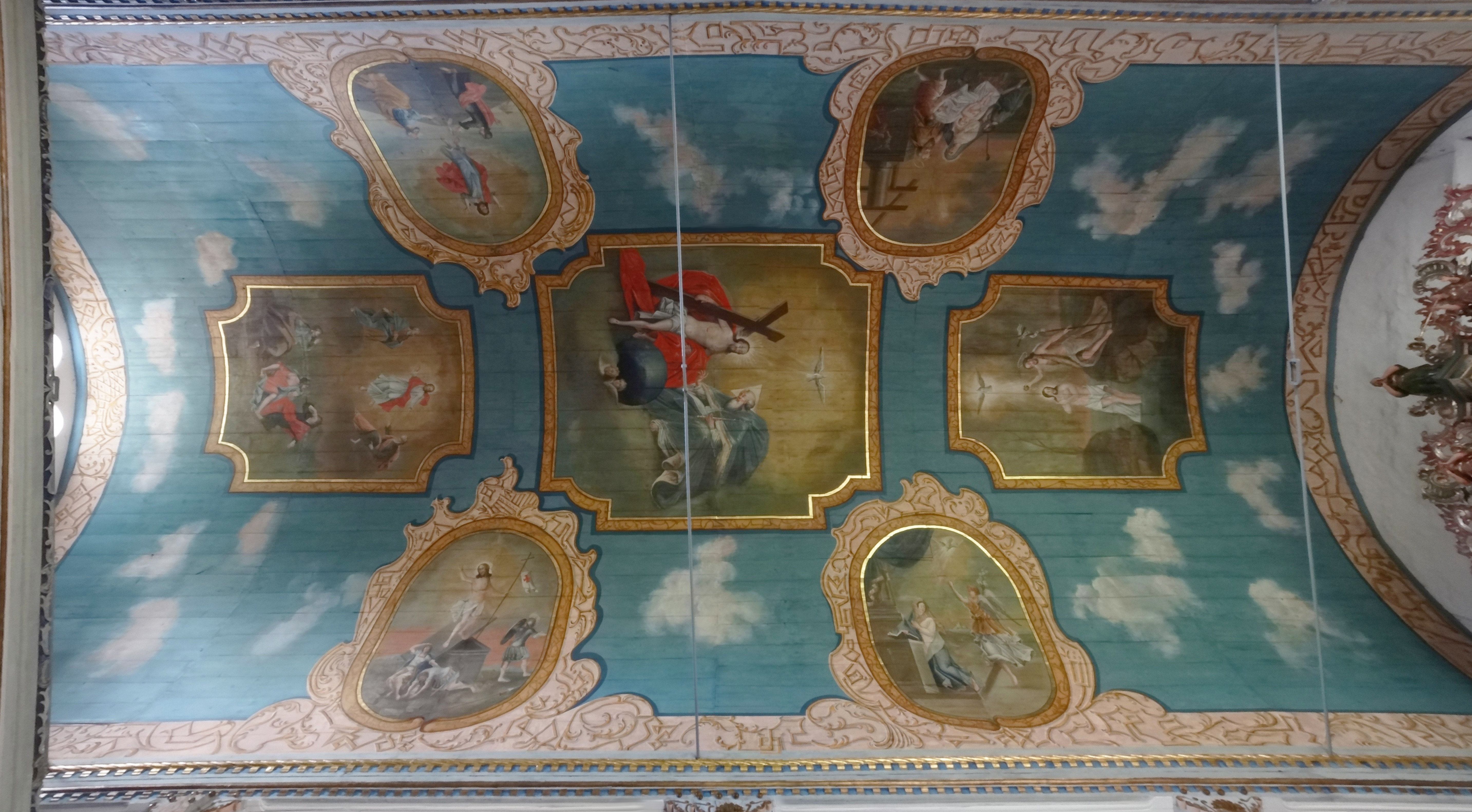 Bettenhausen "Zum heiligen Kreuz", Deckenbilder mit Darstellung der Hl. Dreifaltigkeit von Johann Jacob Prazzo und Johann Jacob Gehres aus Meiningen. Auf dem Tonnengewölbe sind dargestellt: Ankündigung der Geburt; Jesu Taufe; Verklärung Jesu; Auferstehung; Erscheinung des Auferstandenen vor den Jüngern; Christus neben dem Vater thronend.